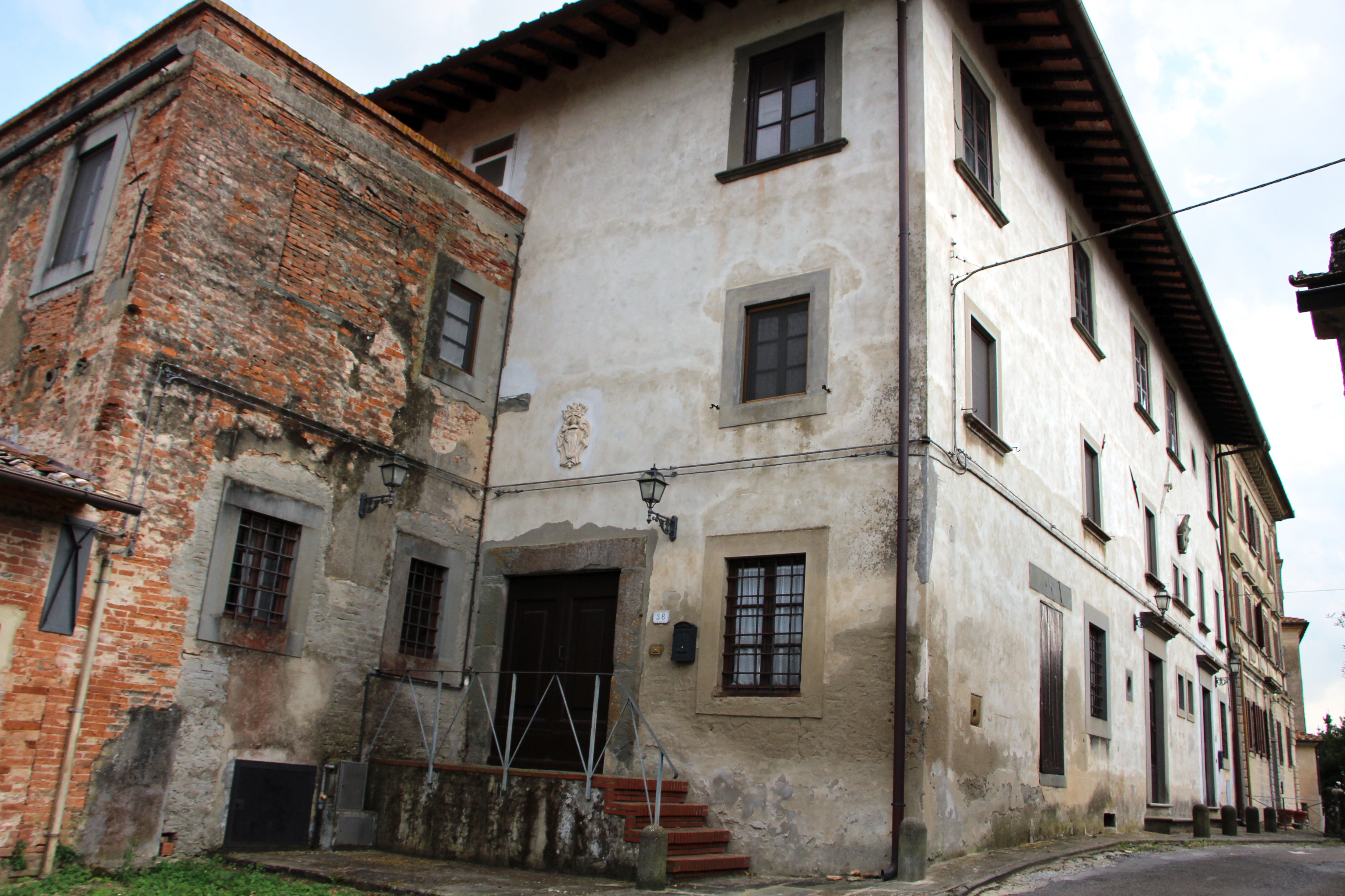 Cerreto Guidi The making of this document was supported by Wikimedia CH. (Submit your project!) For all the files concerned, please see the category Supported by Wikimedia CH.